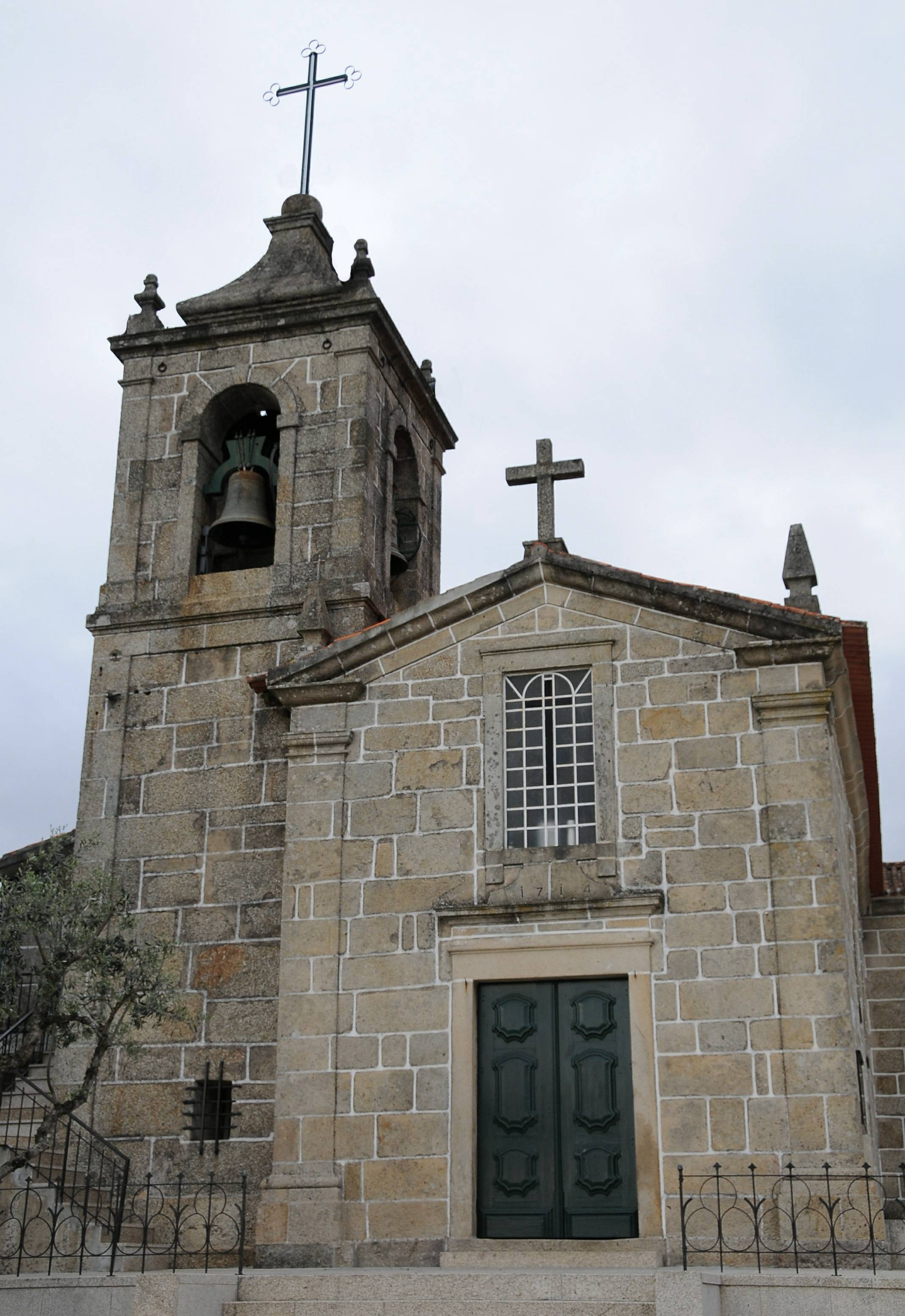 Sao Pedro de Este Church, in Braga Portugal